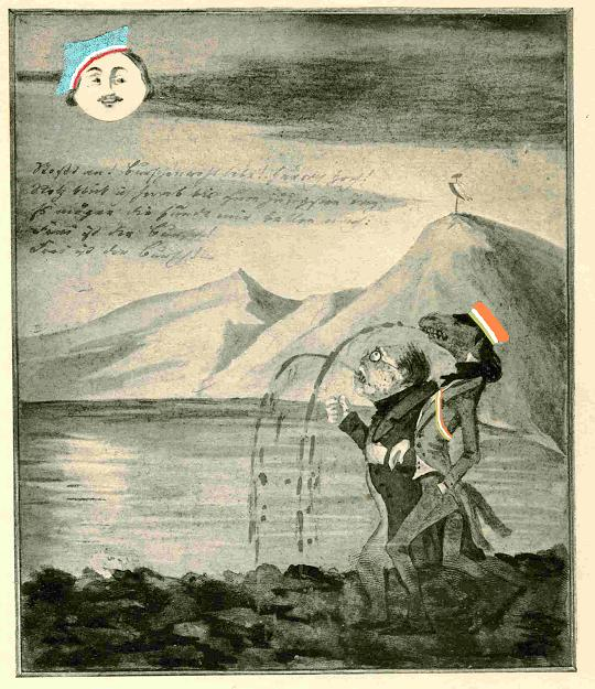 "Was kümmert es den Mond, wenn ihn der Hund anbellt?" Zu Anwürfen einer Königsberger Verbindung malte Ludwig Clericus ein Aquarell, auf dem der Mond mit Masurenmütze spöttisch auf zwei speiende Gestalten herabblickt, von denen die eine mit einem Hundekopf die Farben rot-weiß-gold der Palmburger trägt (Loch-Lippold, Festschrift zu Masovias 100. Stiftungsfest, S. 78; Fabricius: Die Deutschen Corps, 1. Aufl., S. 353).